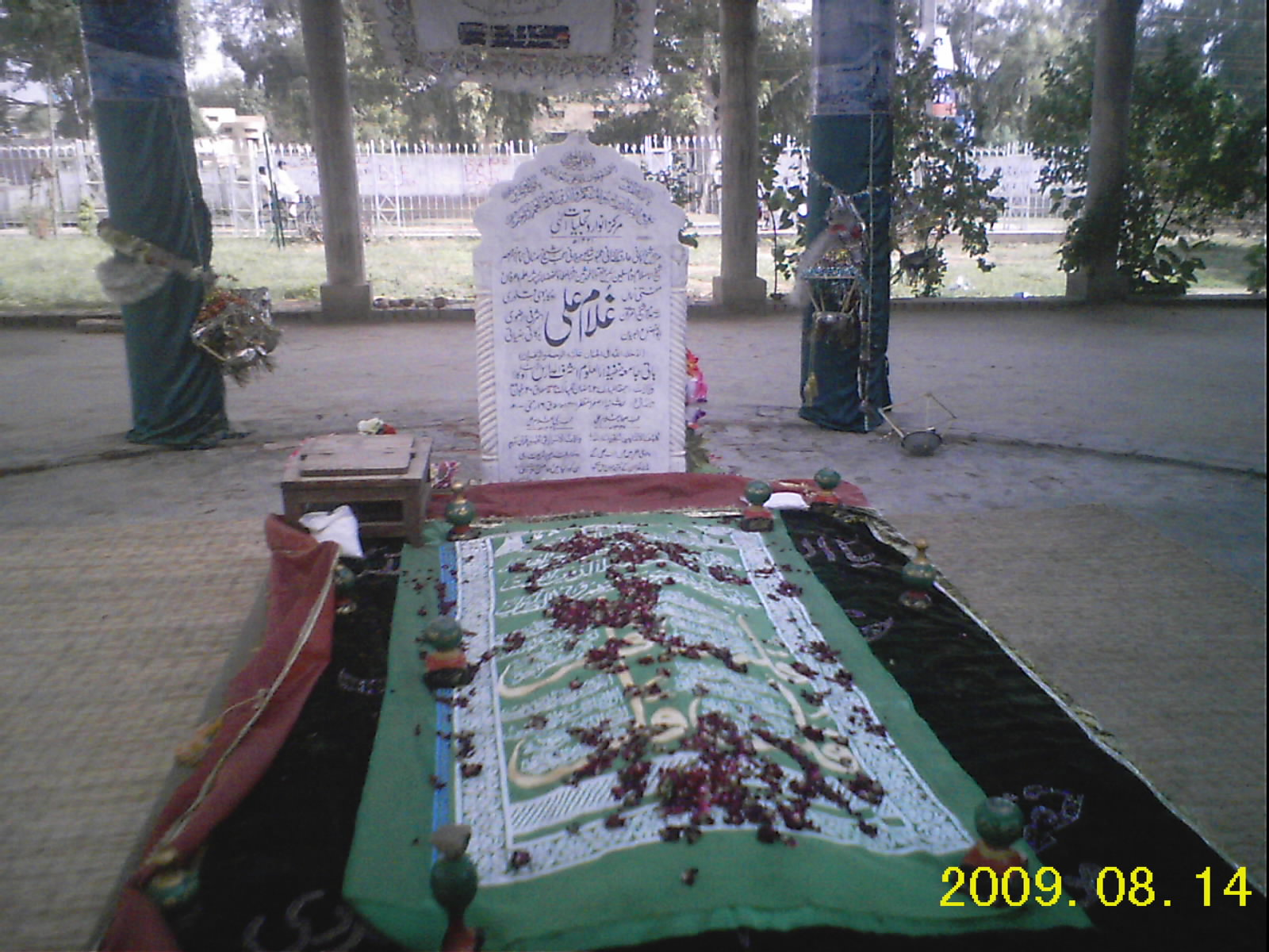 Mazar of Hazrat Molana Shaikhul Quran Ghulam Ali Okarvi